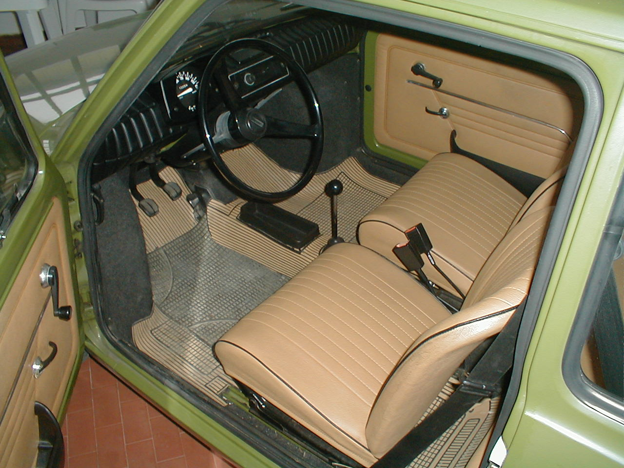 Camilla Giribardi , interno di fiat 126 del 1976 , foto scattata da me.